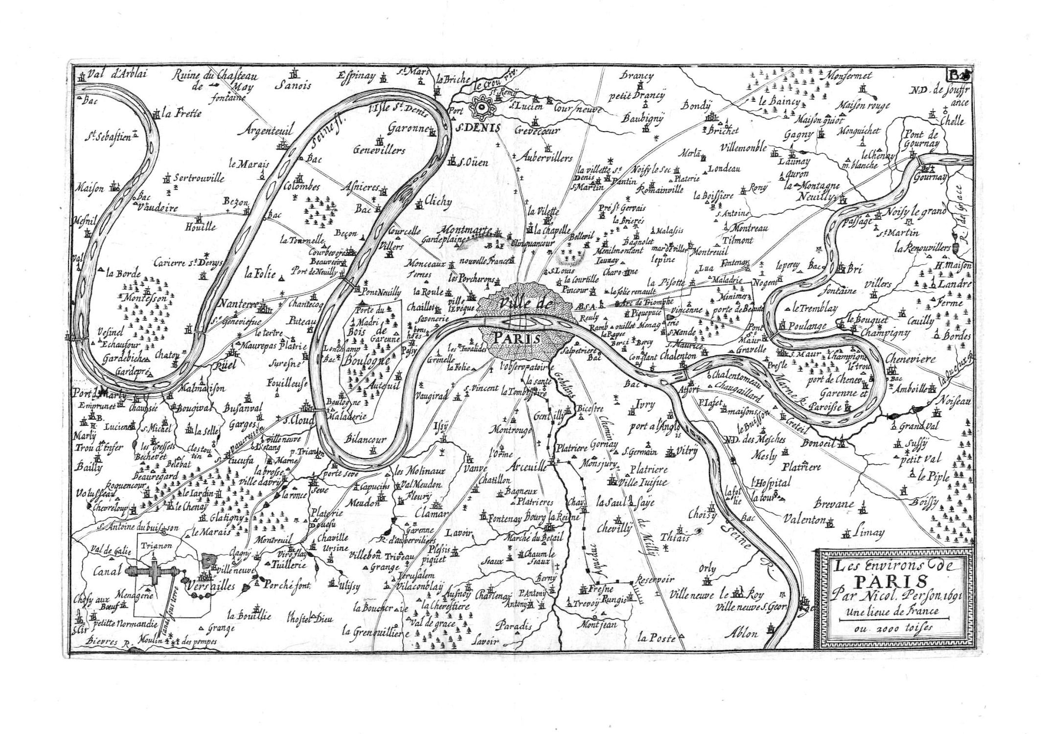 Les Environs de Paris: Eine Karte (Kupferstich) aus dem Festungsbuch Quotidiani Martis Labores cum specialibus Tabellis von Nikolaus Person aus dem Jahre 1691. Das Blatt ist nach Norden ausgerichtet und zeigt Paris und Umgebung.